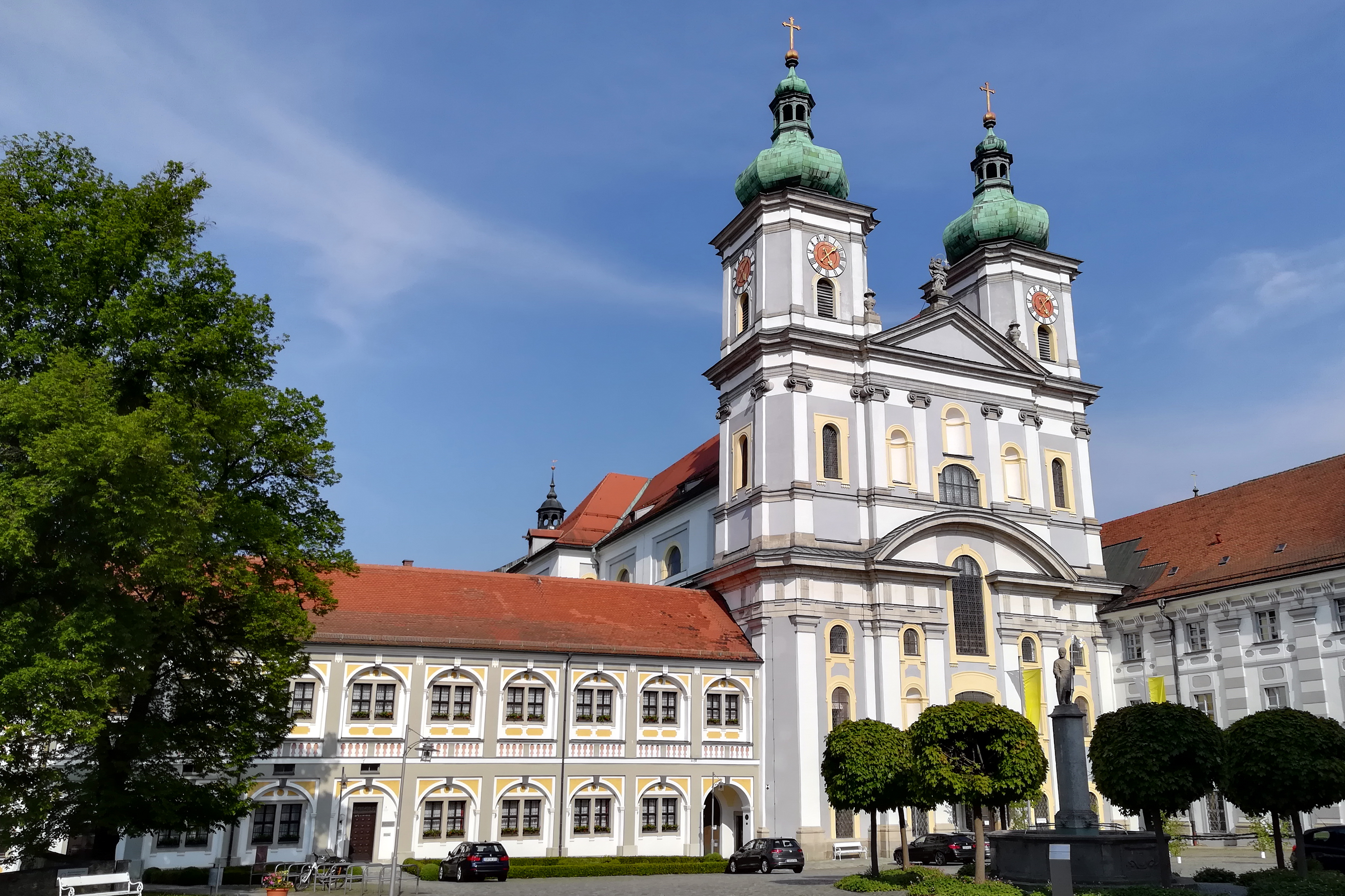 Die Stiftsbasilika Waldsassen in dem bayerischen Ort Waldsassen wurde von 1685 bis 1704 als Klosterkirche der Zisterzienserinnen der Abtei Waldsassen erbaut.